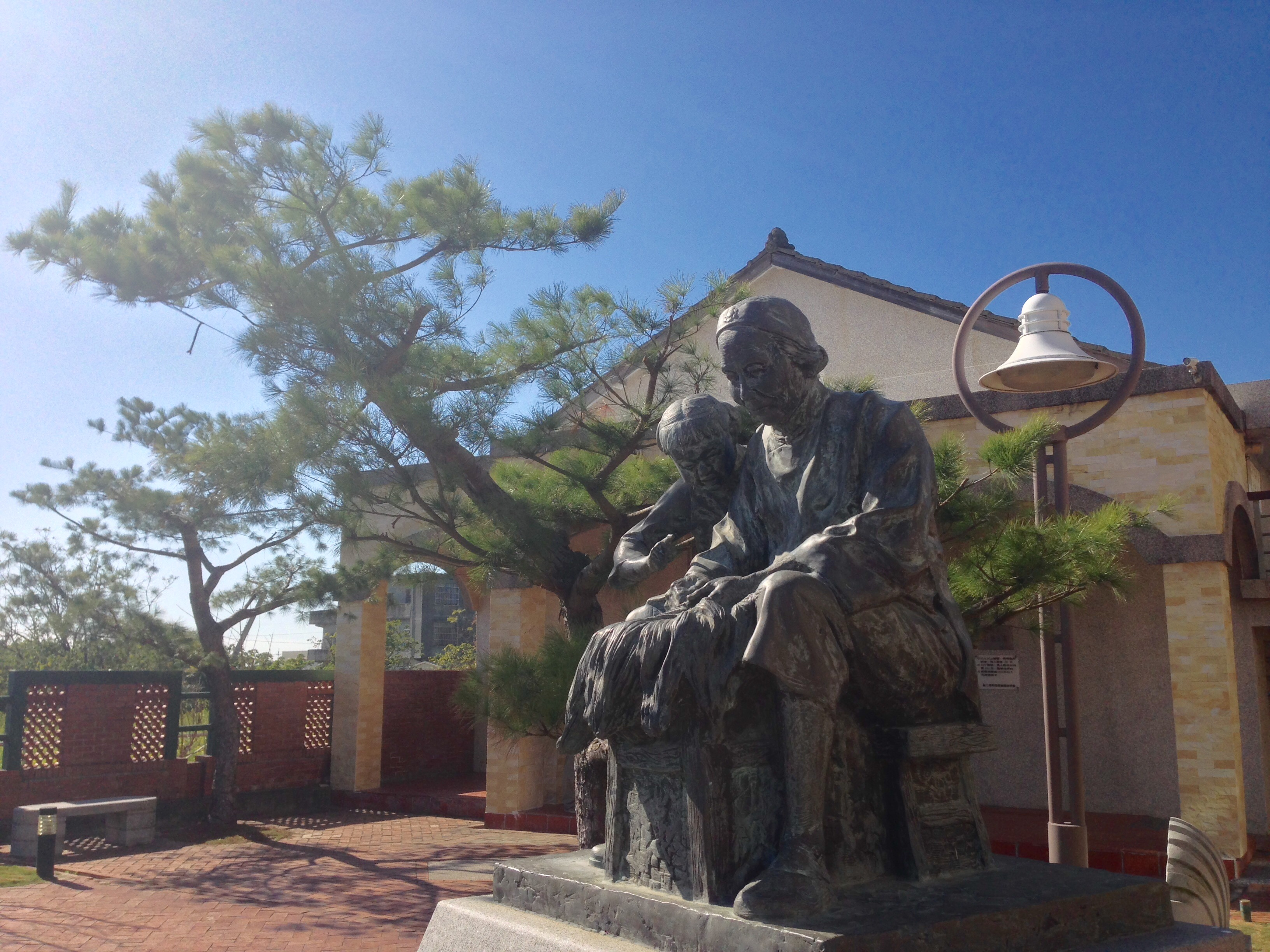 苑裡藺草文化館與洪鴦銅像